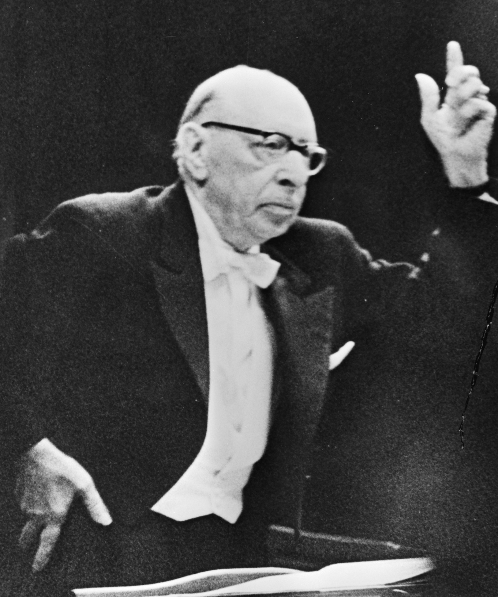 Stravinski tijdens een concert in Warschau op 29 mei 1965